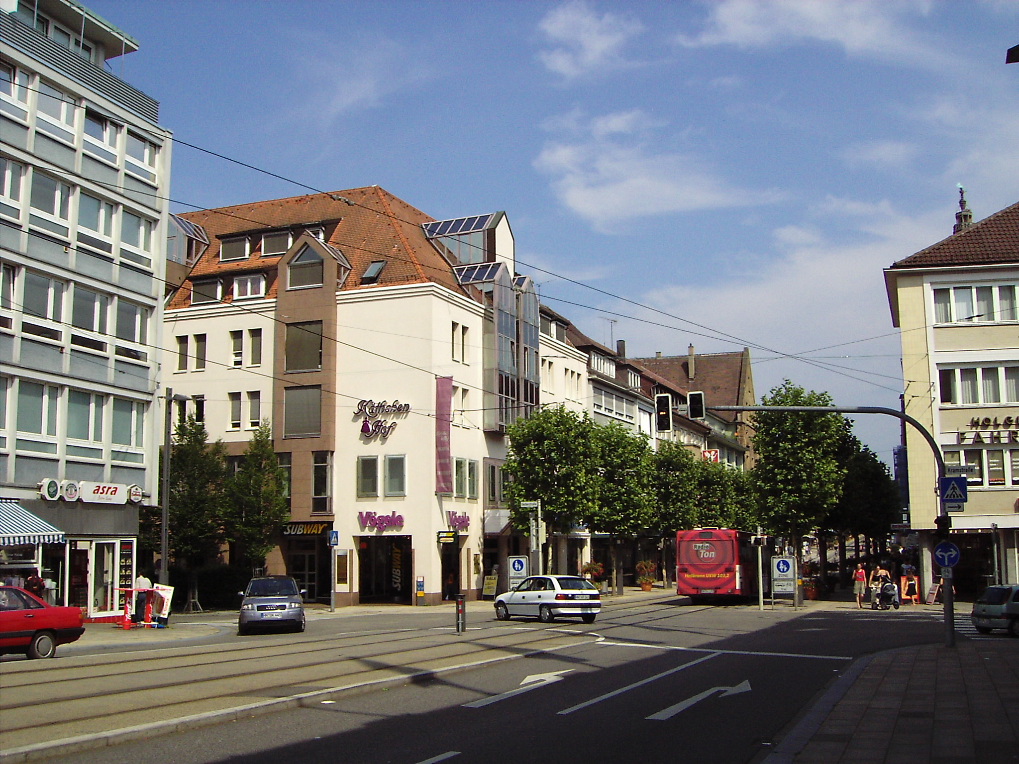 Street Kaiserstraße crossing Kramstraße of Heilbronn - Germany